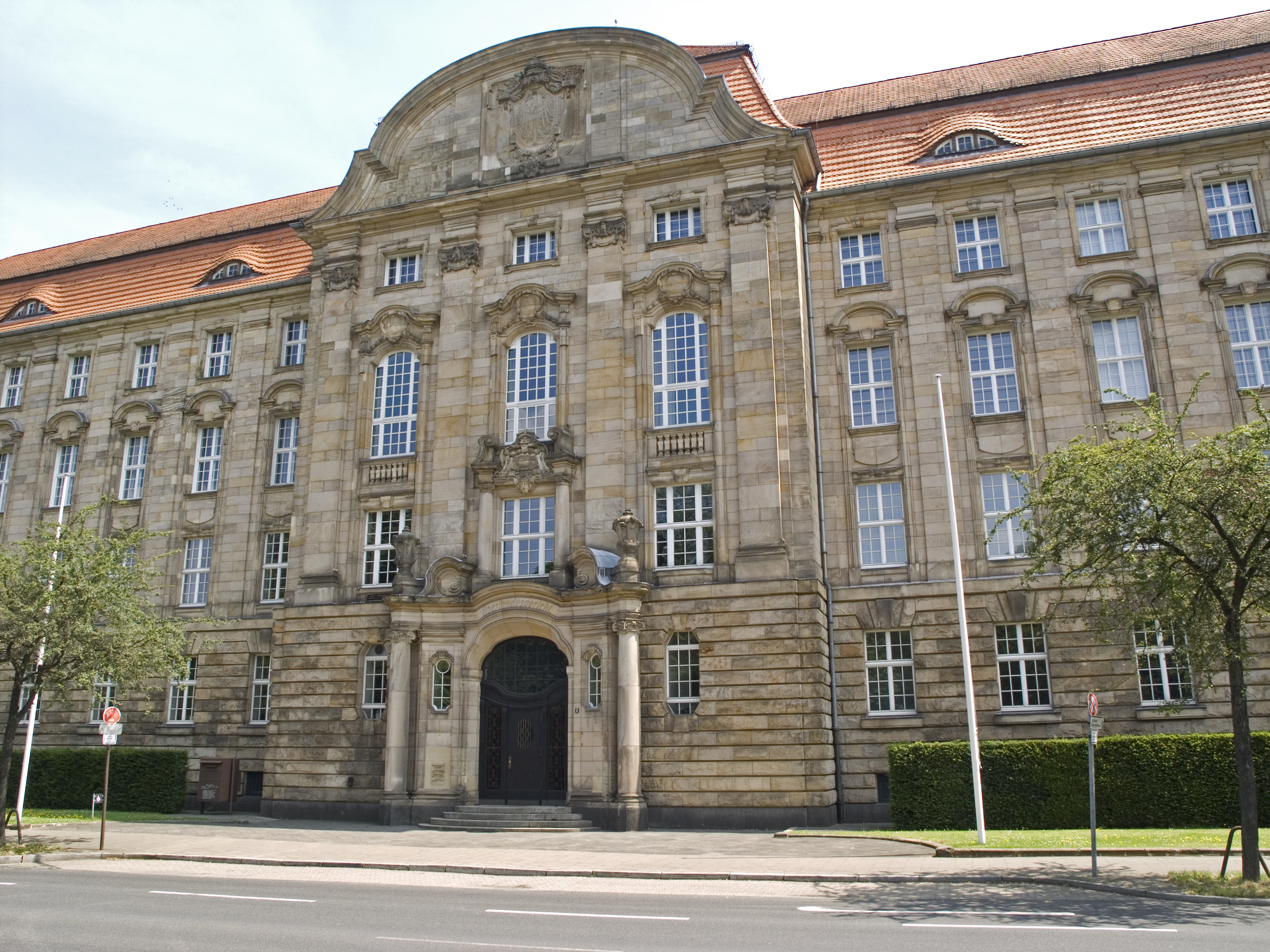 Северный Рейн - Вестфалия, Дюссельдорф. Памятник Вестфальским уланам